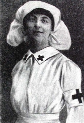 Norbertina hraběnka Kinská z Vchynic a Tetova, rakouská zdravotní sestra Červeného kříže